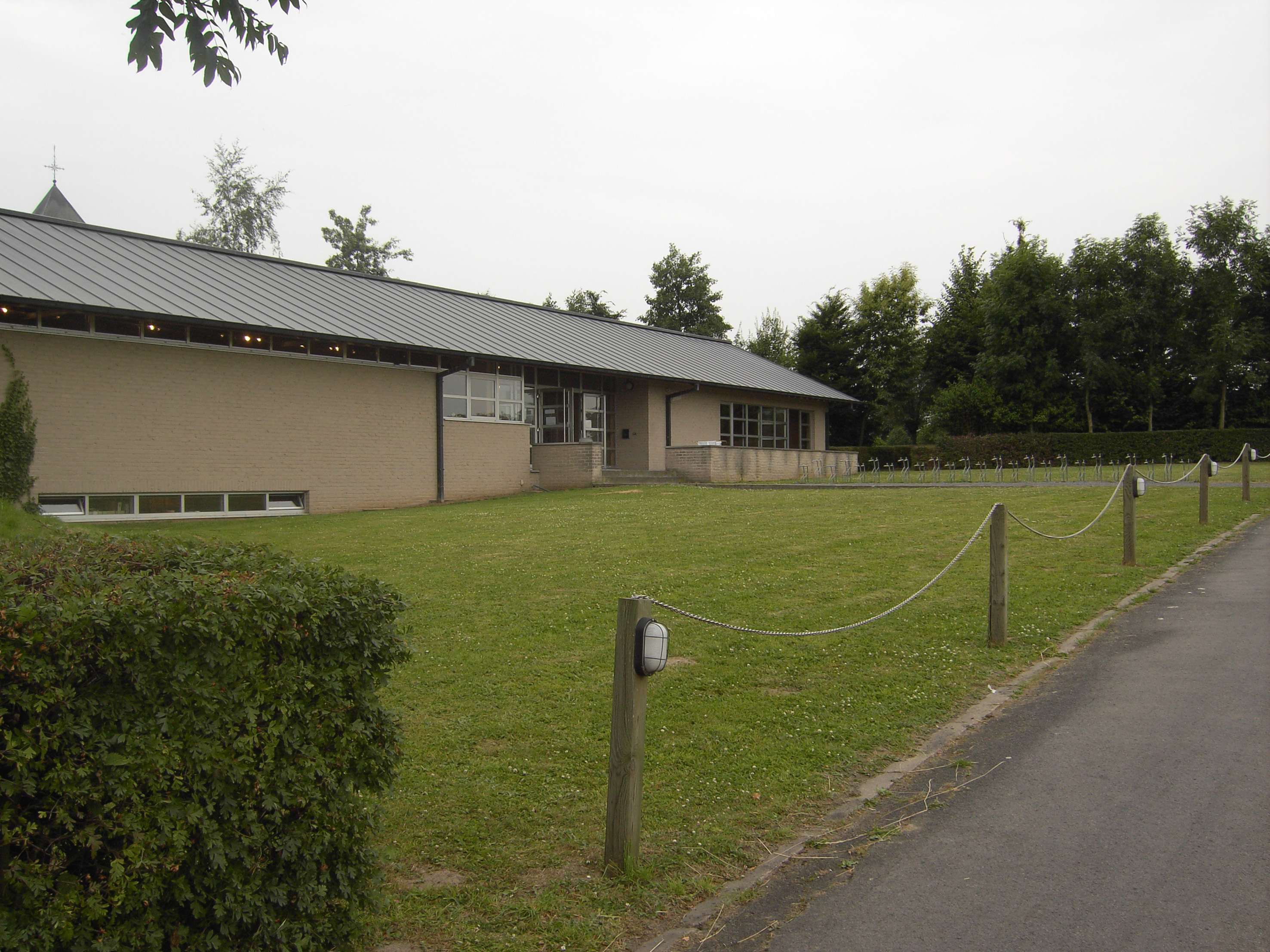 Het Ontmoetingscentrum van Waarmaarde is gelegen in de Rijtstraat 4 te Waarmaarde en behoort tot het Regionaal Archeologisch Museum van de Scheldevallei.